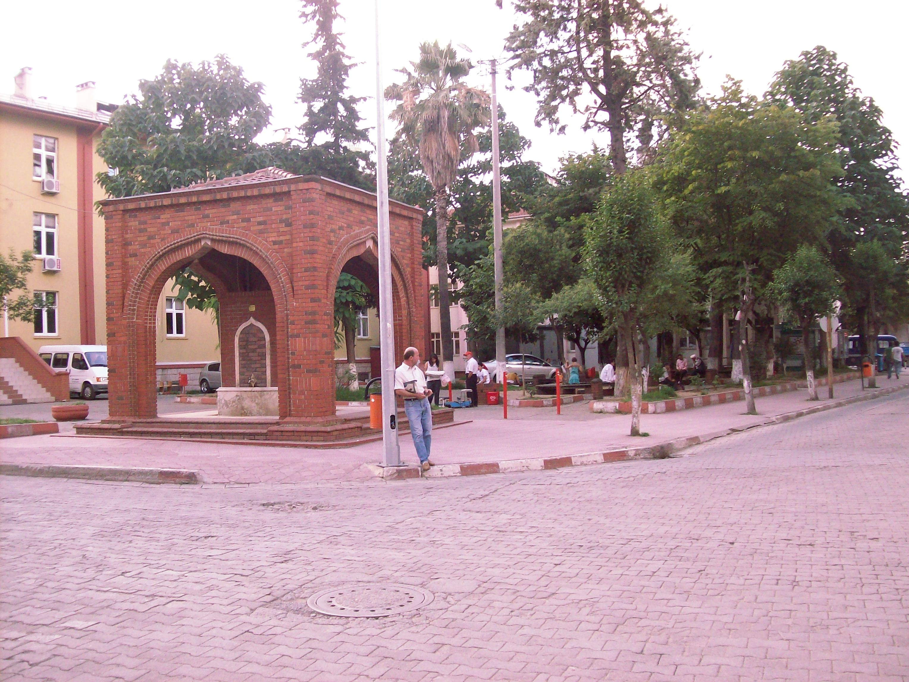 Bulancak Meydan